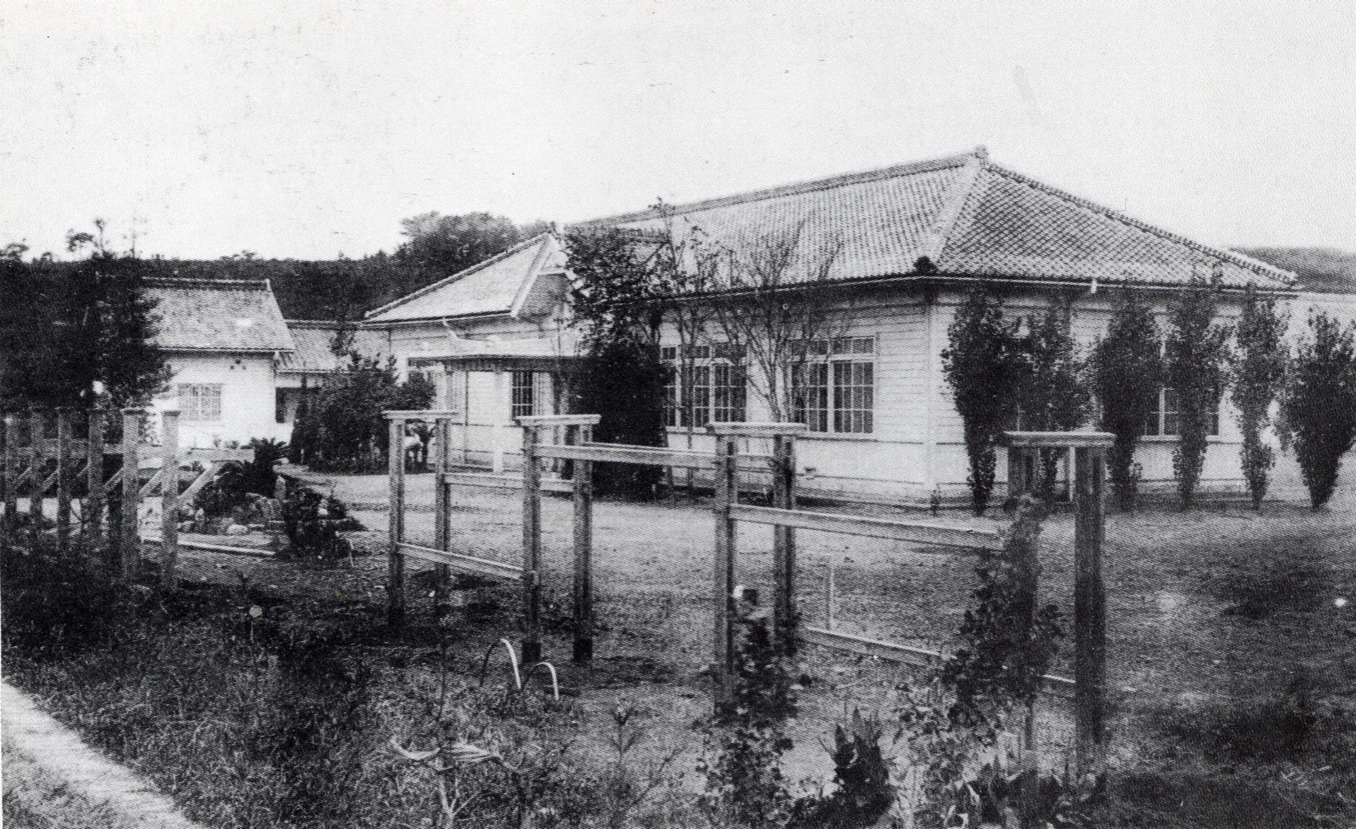 昭和初期の岡崎市立商業学校（現・愛知県立岡崎商業高等学校）